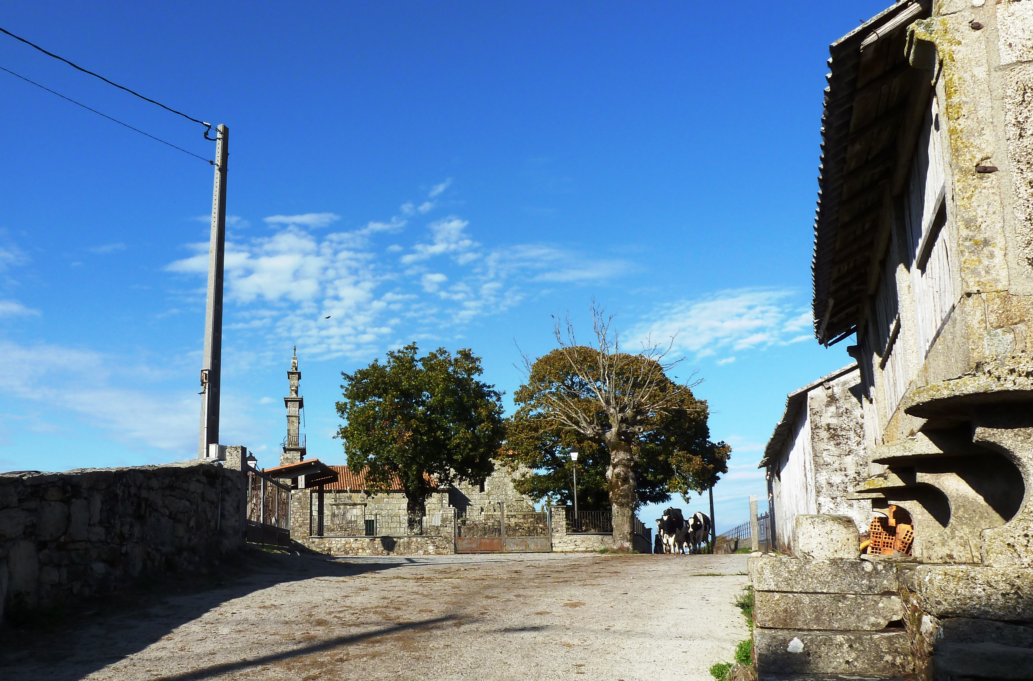 Camiño da igrexa en Furco, Carballedo